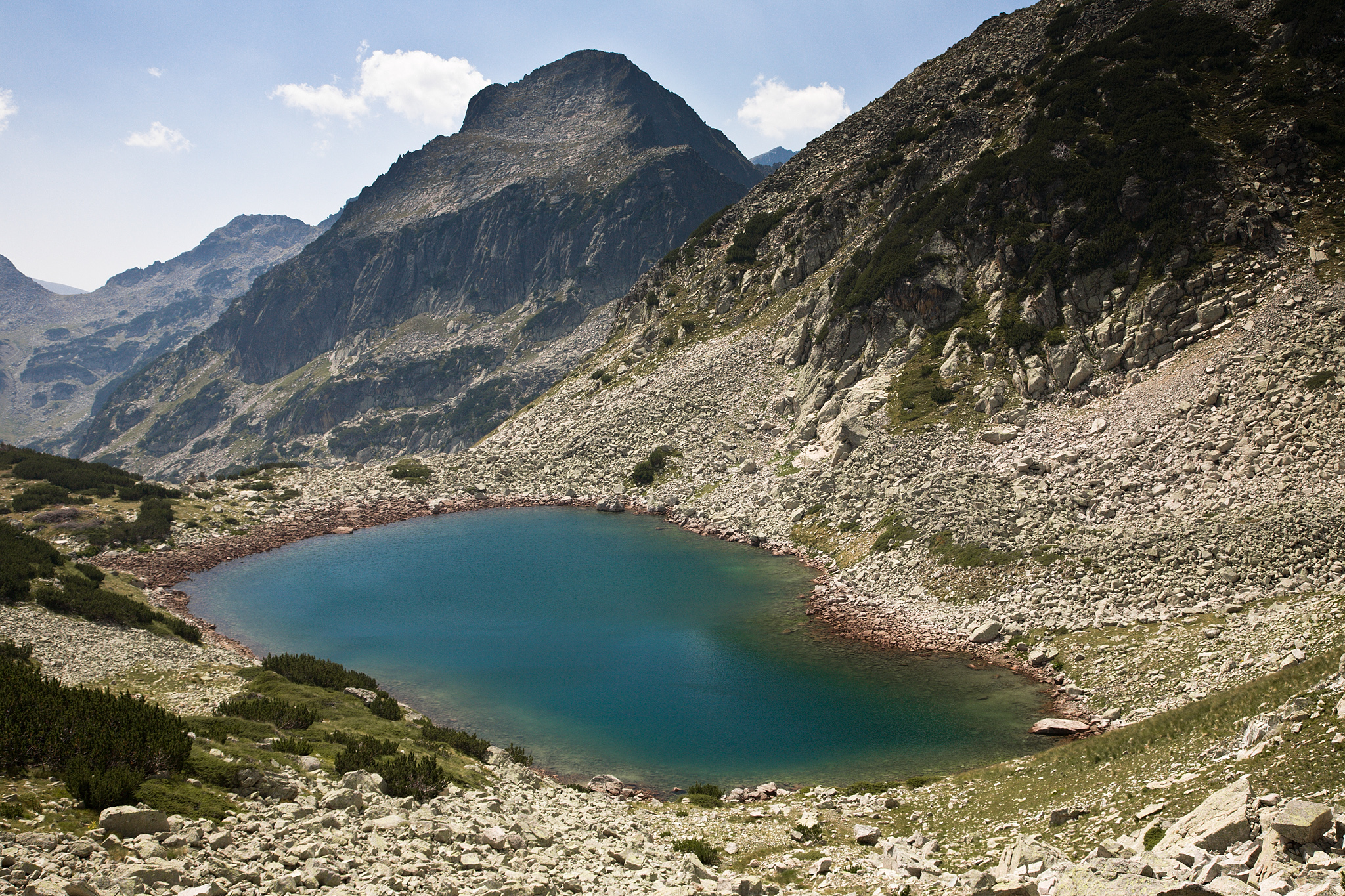 Пирин, Пирин, Долното Полежанско езеро и в. Джангал (Момини двори)